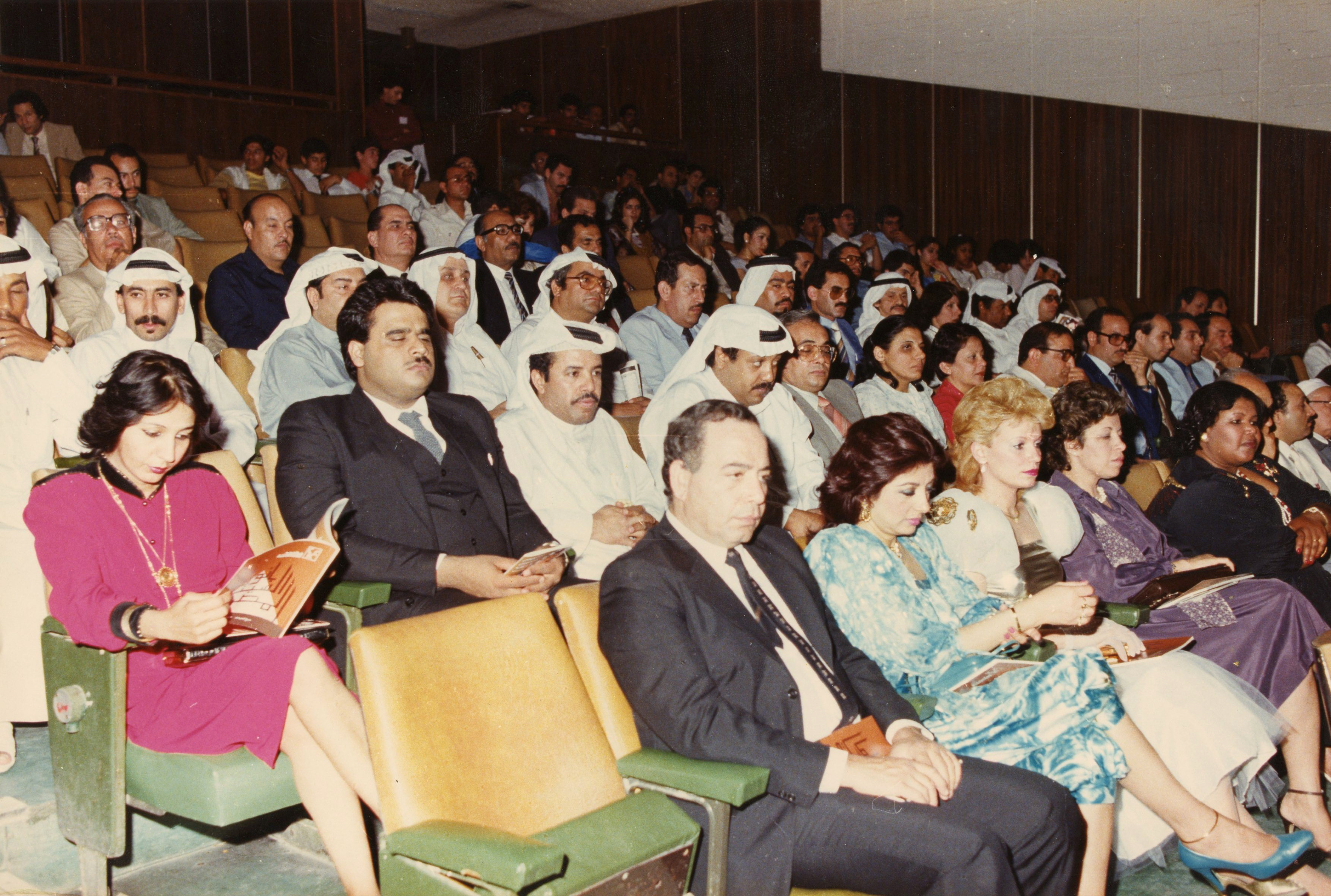 في حفل افتتاح مهرجان السينما المصرية بنادي الكويت للسينما في مايو 1983